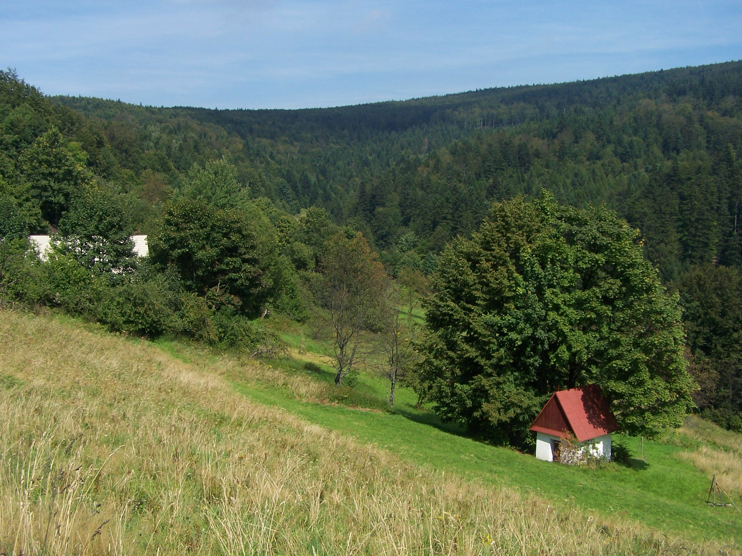 Polana Weszkówka i widok na Pasmo Lubomira i Łysiny